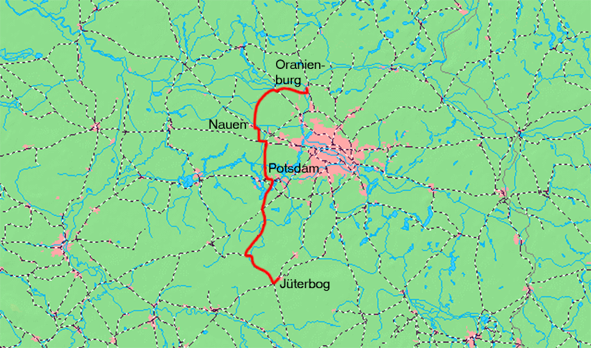 Umgehungsbahn in Brandenburg